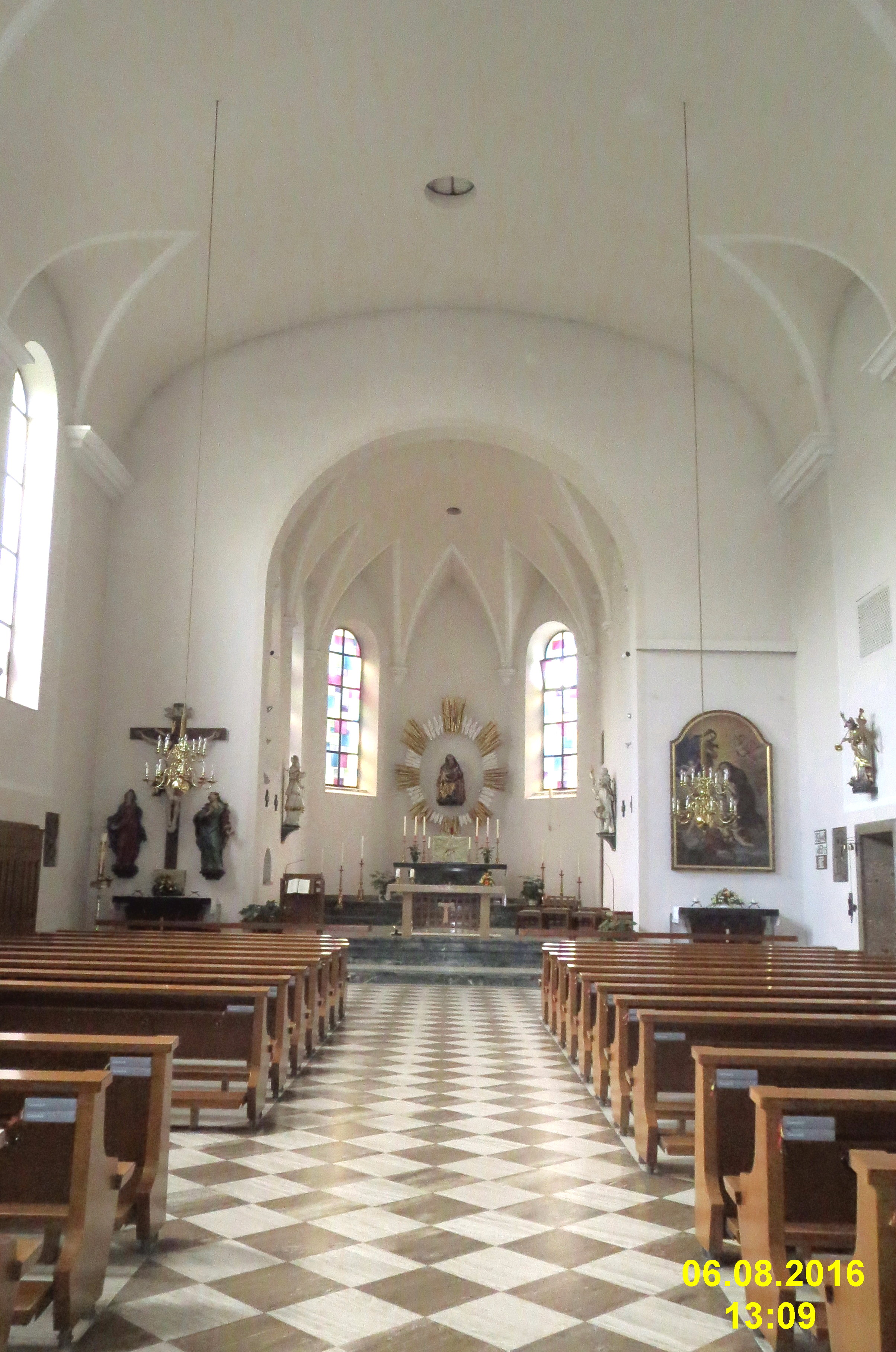 Reutte, St.-Anna-Kirche, Blick zum Chor